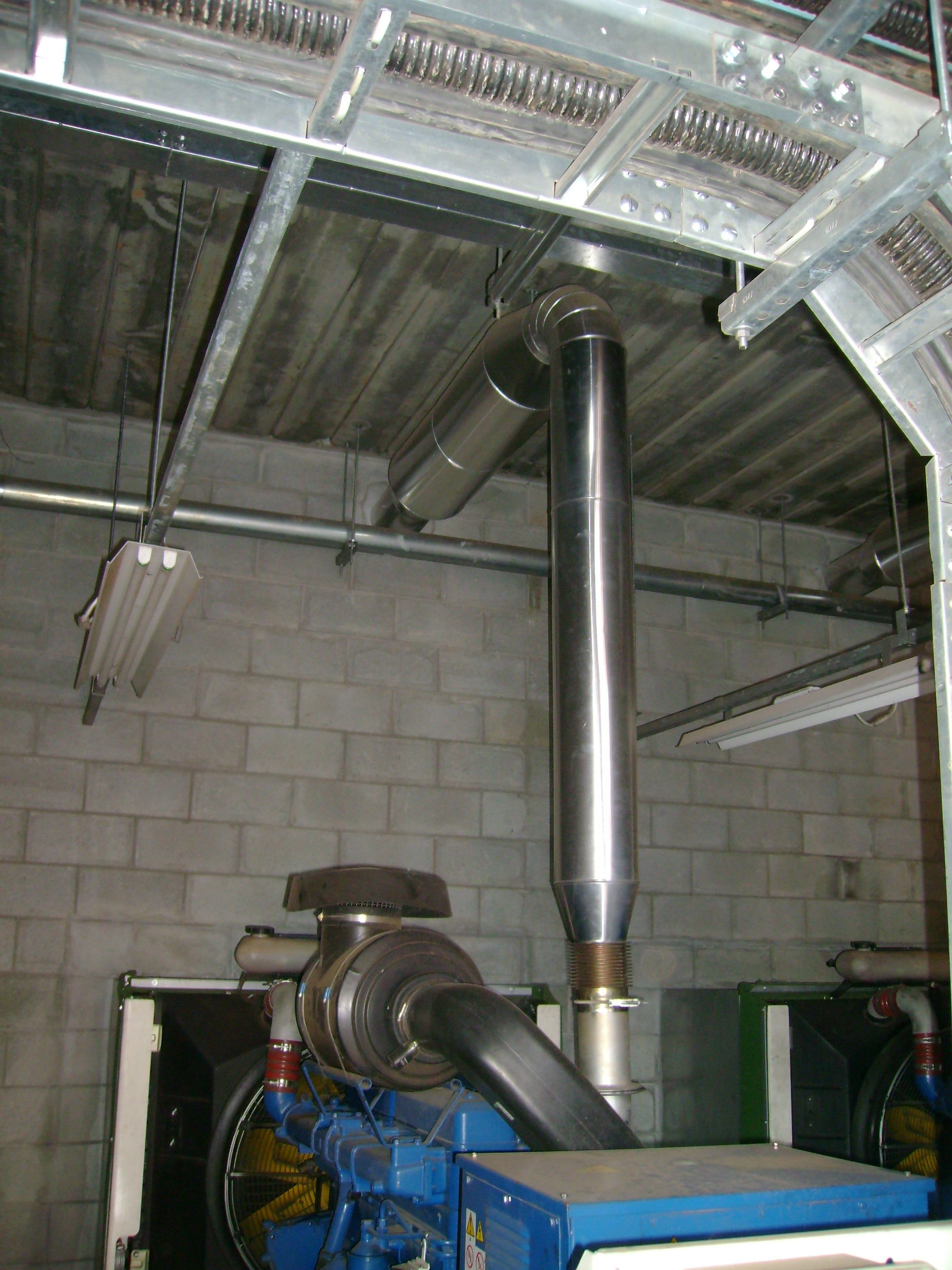 silencioso hospitalr peça que diminuio ruído do escapamento